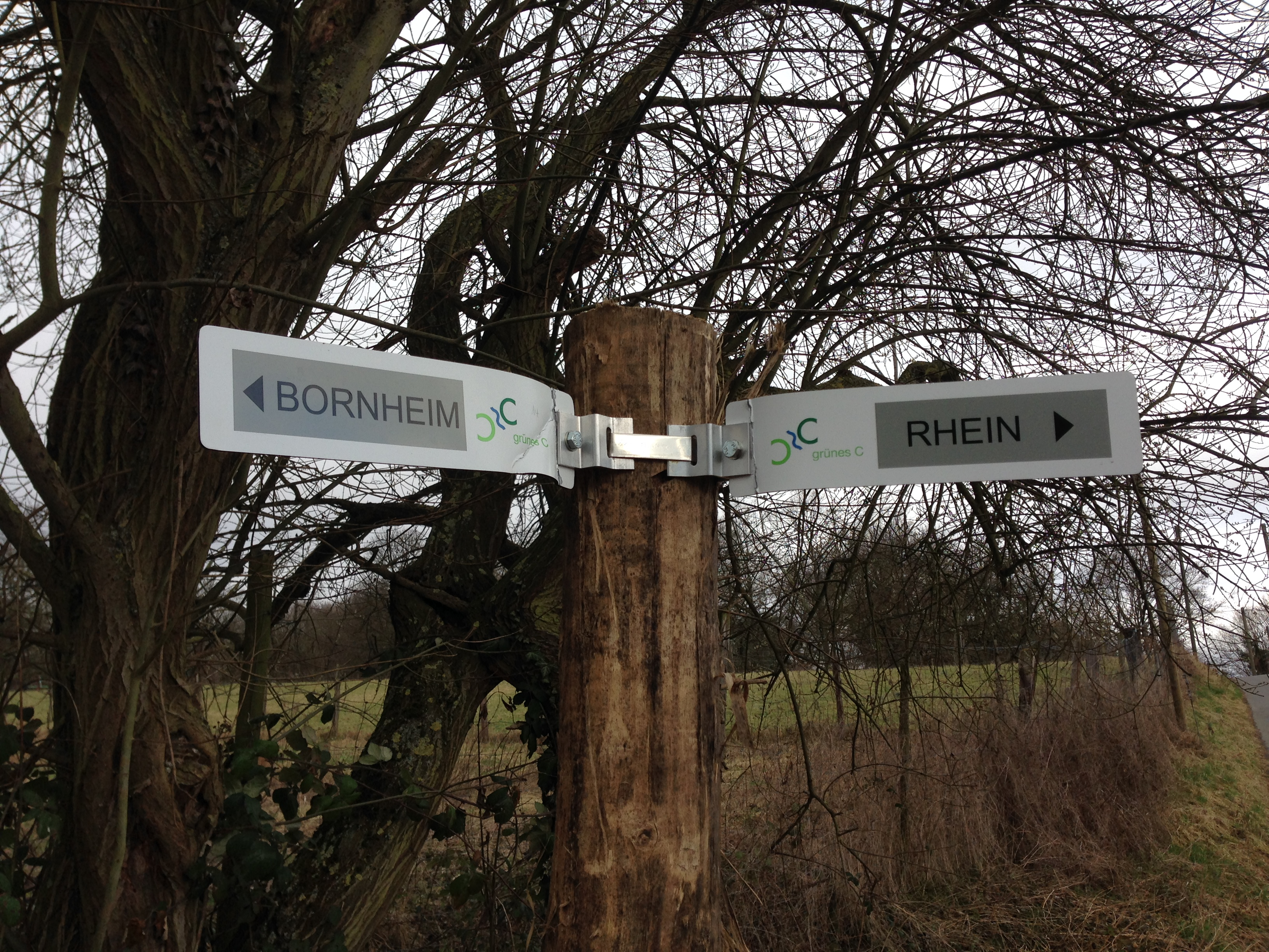 Wegweiser im Grünen C